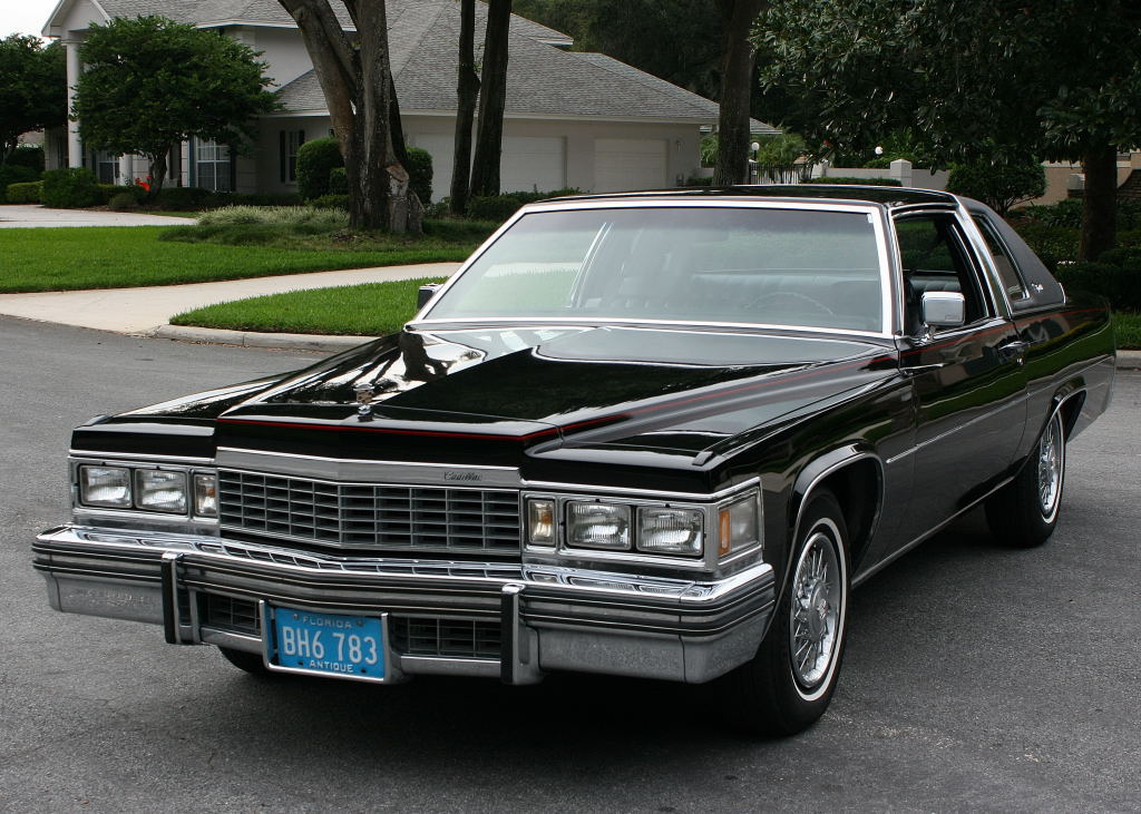 1977 Cadillac Coupe Deville